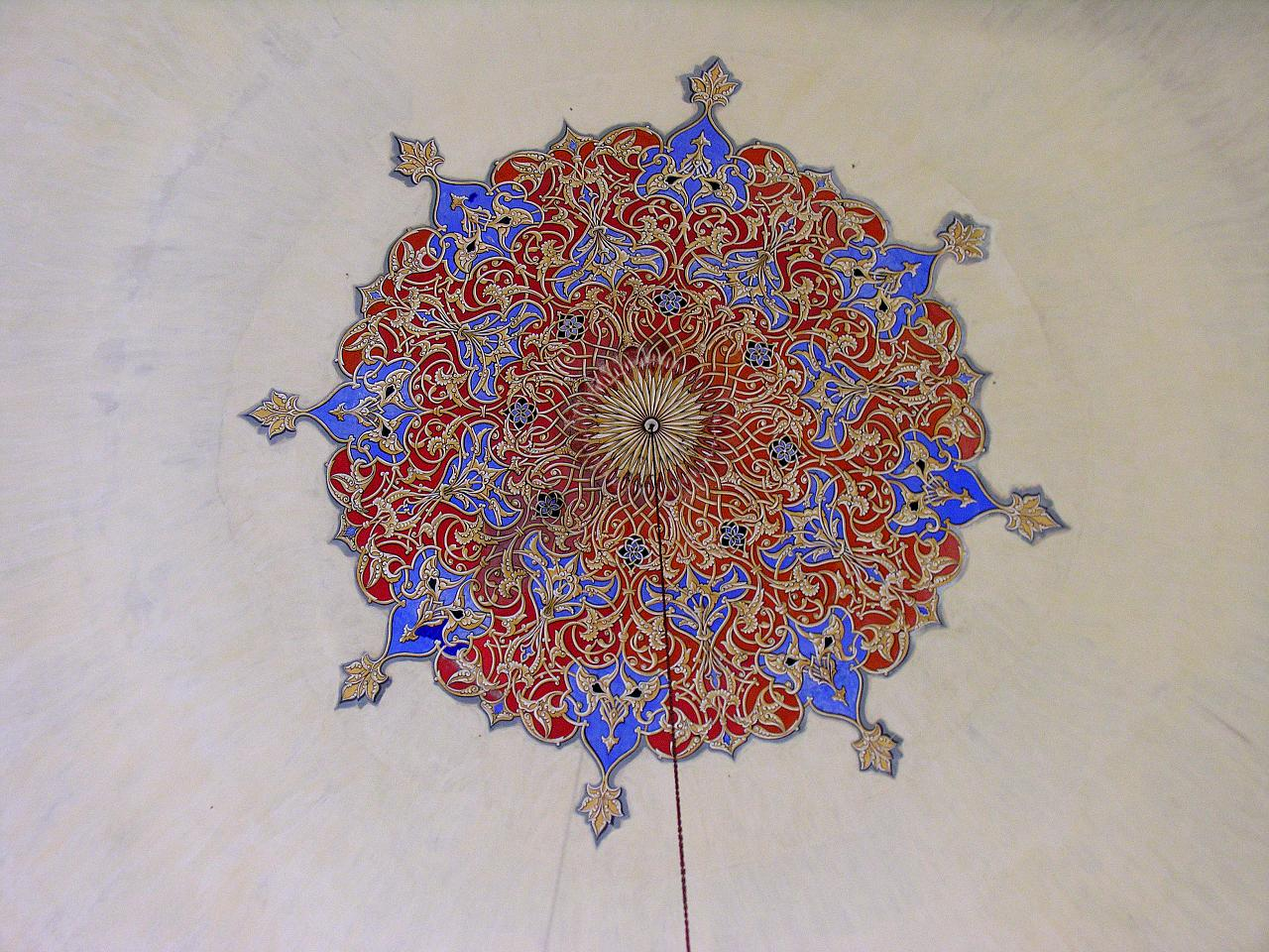 Turkey-1360